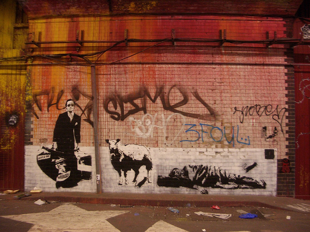 Leake Street, Waterloo, London 2008